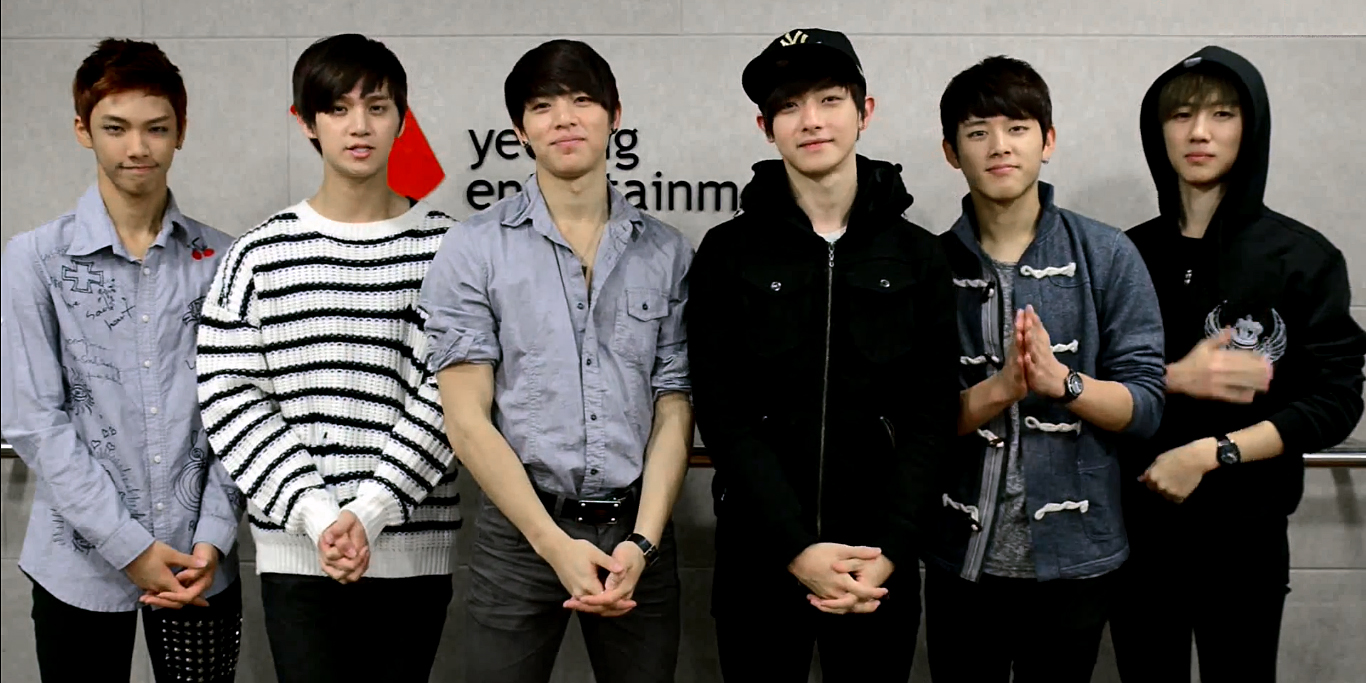 C-CLOWN 데뷔 100일 축하영상